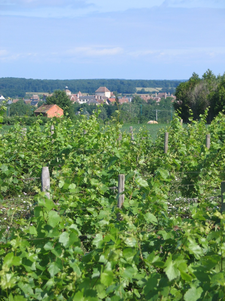 Vignoble de Chateaumeillant au Printemps